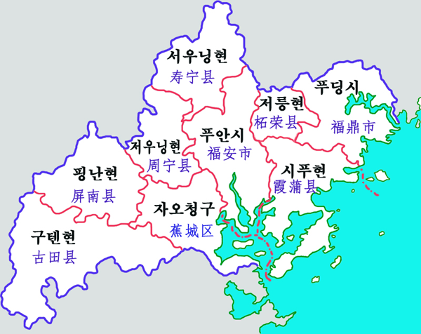 푸젠성 닝덧 현급구역도